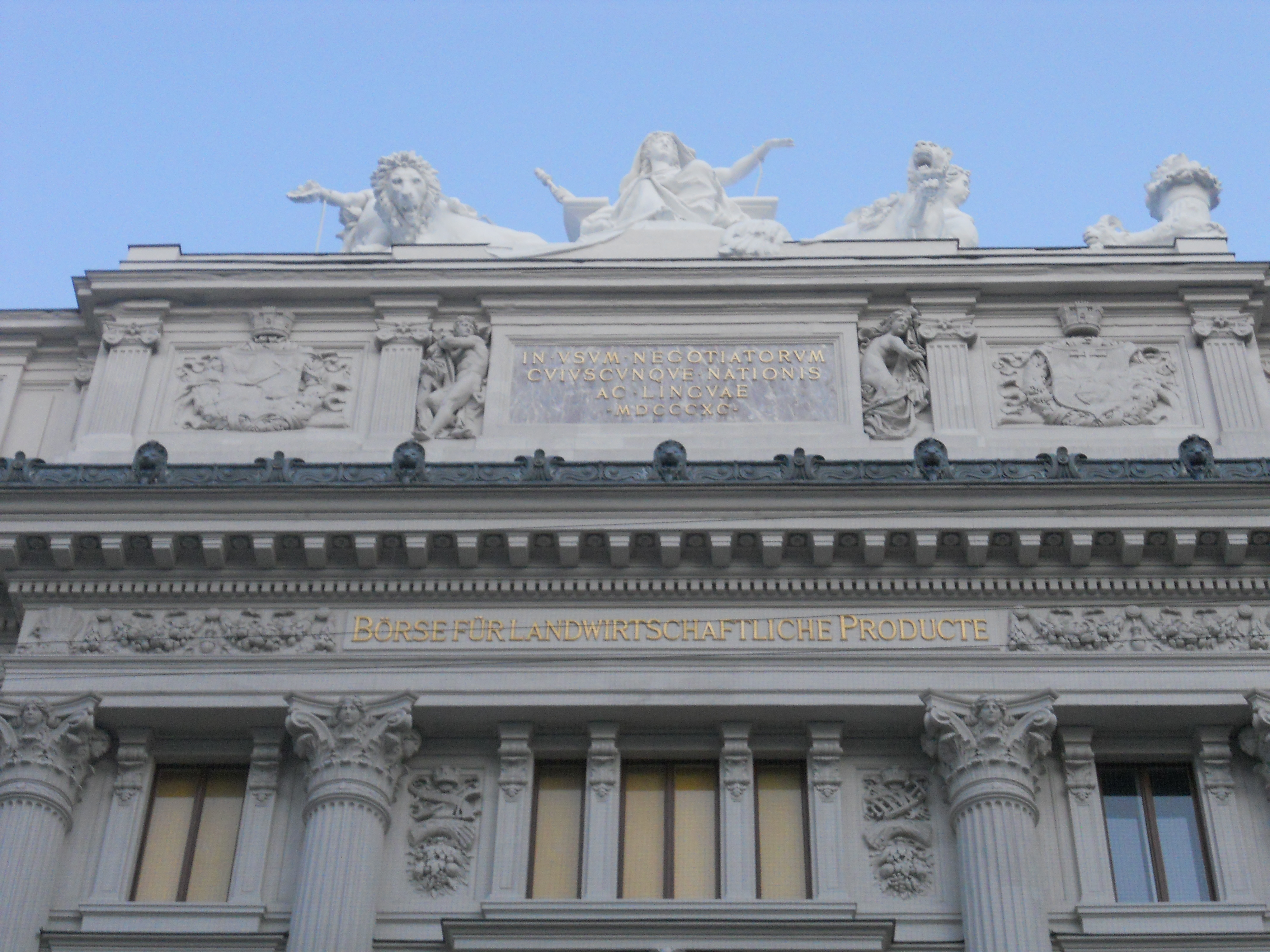 Attika der ehemaligen Börse für landwirtschaftliche Produkte in der Taborstraße in Wien